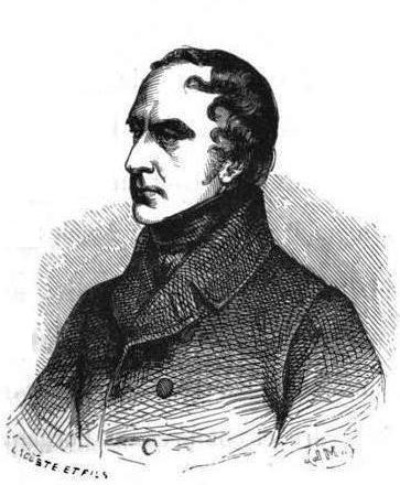 Guizot